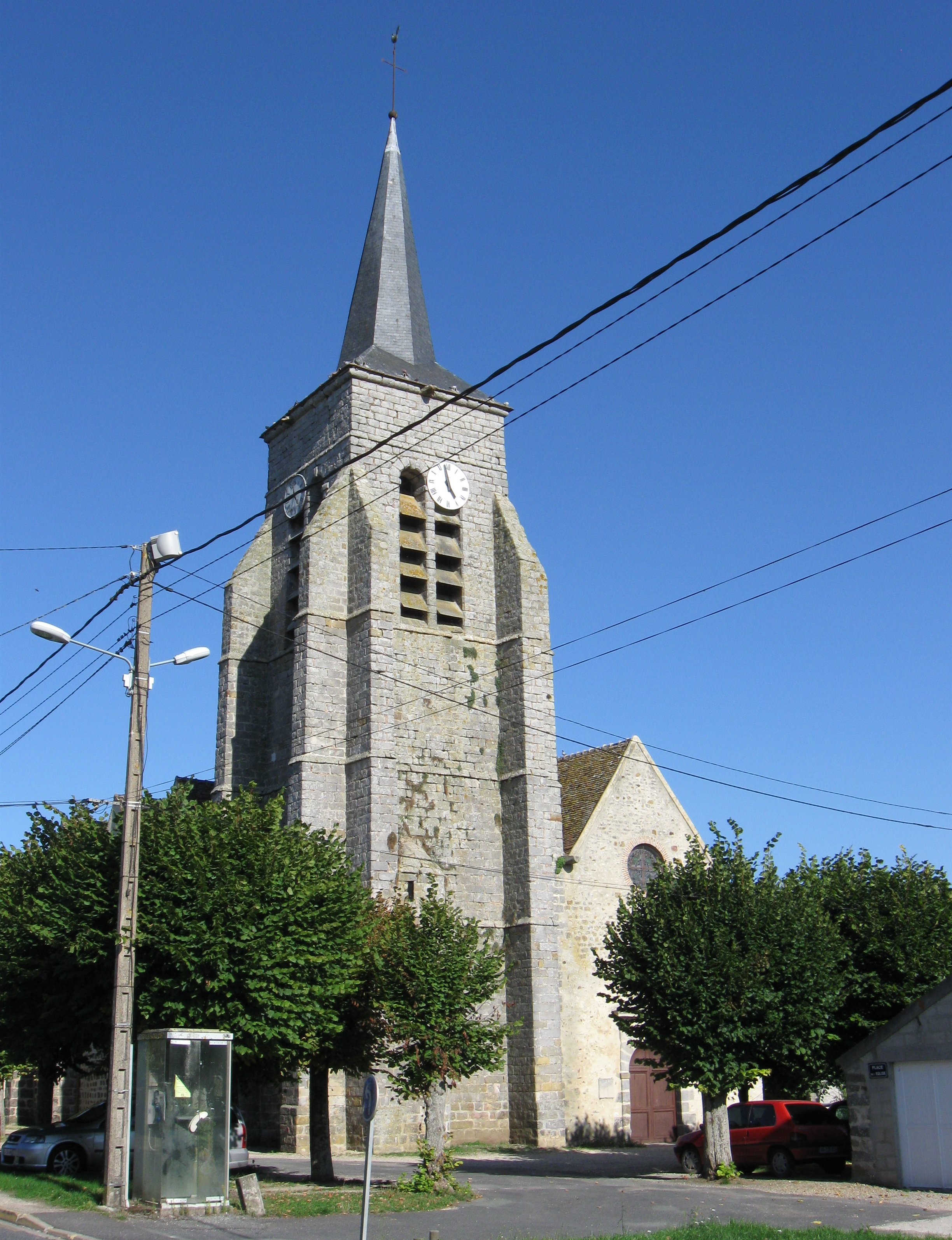 Église Saint-Étienne de Châtenay-sur-Seine. (Seine-et-Marne, région Île-de-France).